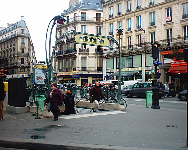 Station Cadet du Métropolitain de Paris.